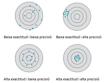 Figura. 1 Representació gràfica de l’ exactitud i la precisió que utilitza com a exemple el patró que forma un conjunt de dards en una diana. Resultats molt precisos (a dalt i a la dreta) amb una mitjana que no és exacta. Resultats poc precisos (a baix i a l’esquerre) amb una mitjana que si és exacta.